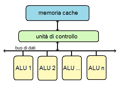 Schema semplificato dell'architettura di un processore vettoriale generico.